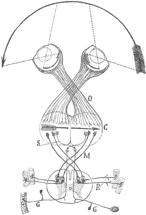 Cajal's Darstellung seiner Theorie. O= Chiasma Optica; C=Visuelle Rinde (und Motorische Rinde); M, S=gekreuzte motorische und sensorische Bahnen von und aus dem Rückenmark; R, G: Sensorische und motorische Ganglien und Nerven.